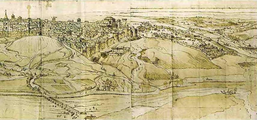 Vista de Madrid: dibujo preparatorio (1562). Anton Van der Wyngaerde (fragmento con el solar del futuro barrio Imperial)